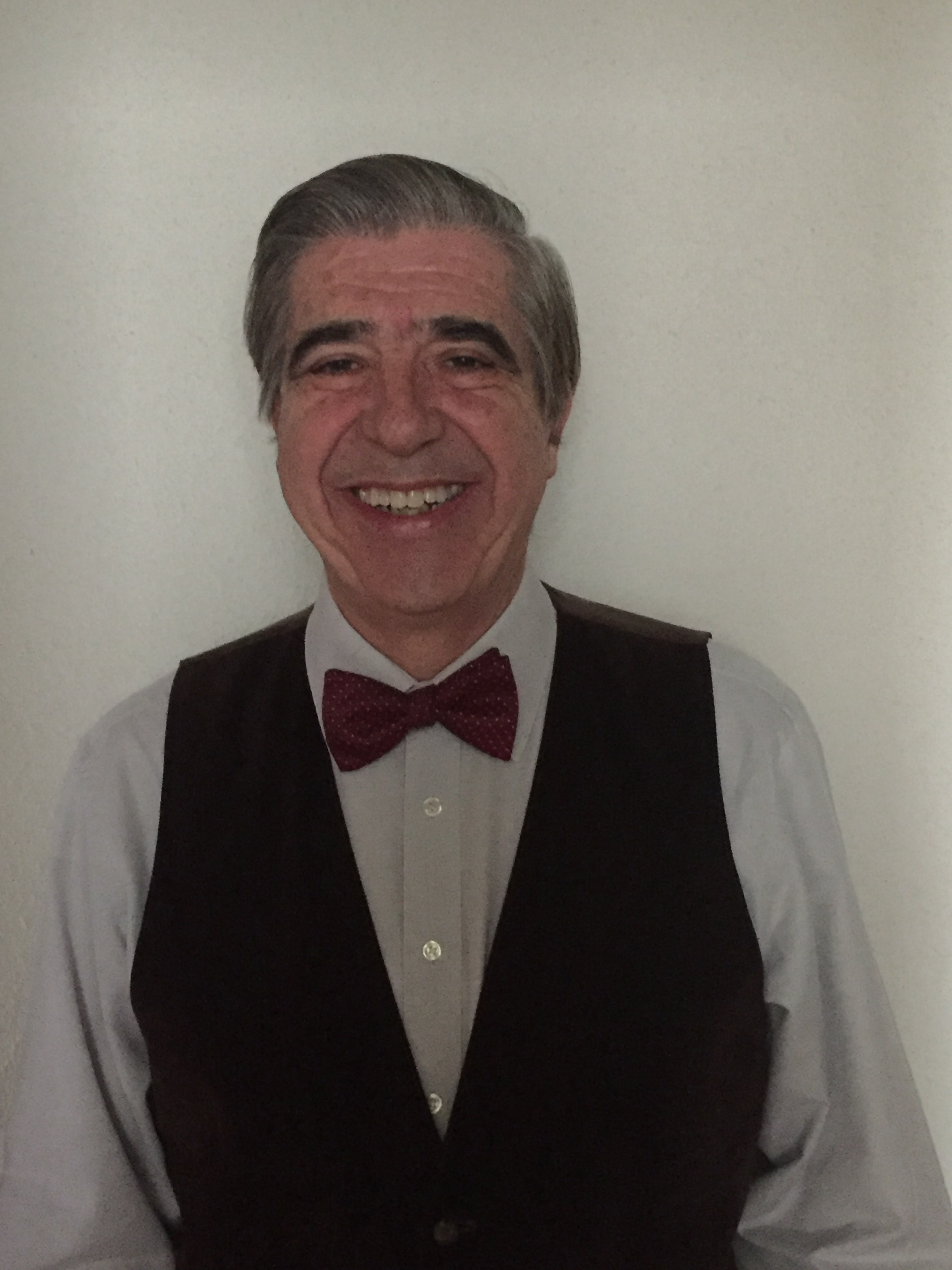 Fernando Gómez-Bezares (2018)